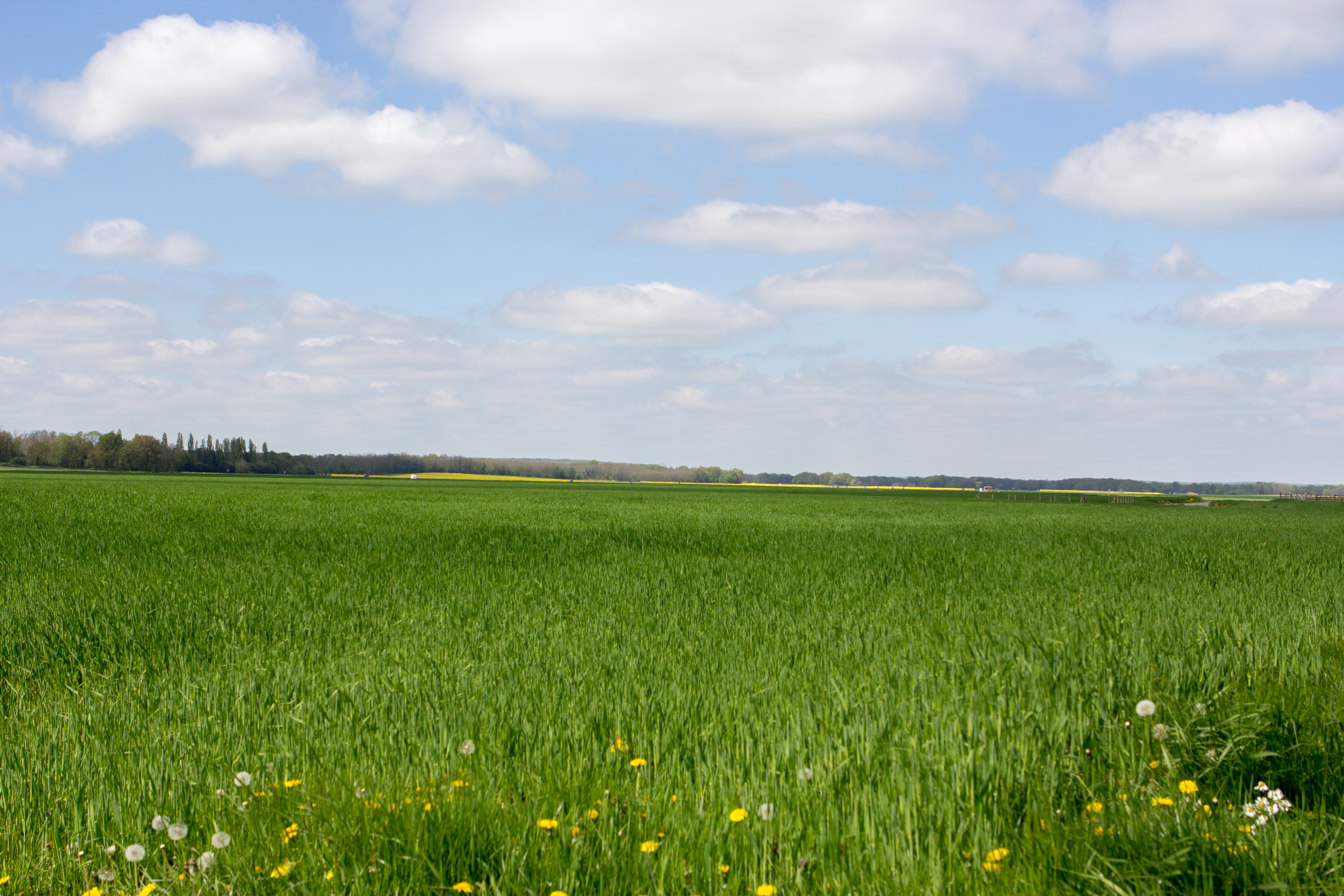 Paysage de Chailly-en-Bière (Commune de Chailly-en-Bière, Seine-et-Marne, France)